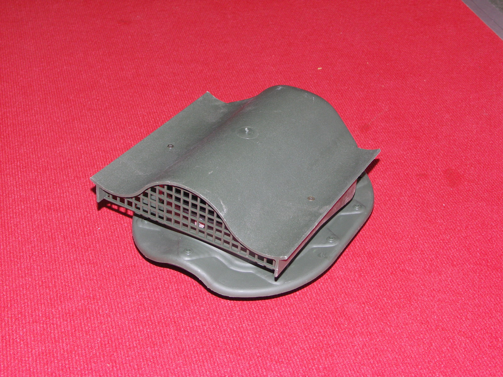 Вентиляционный выход